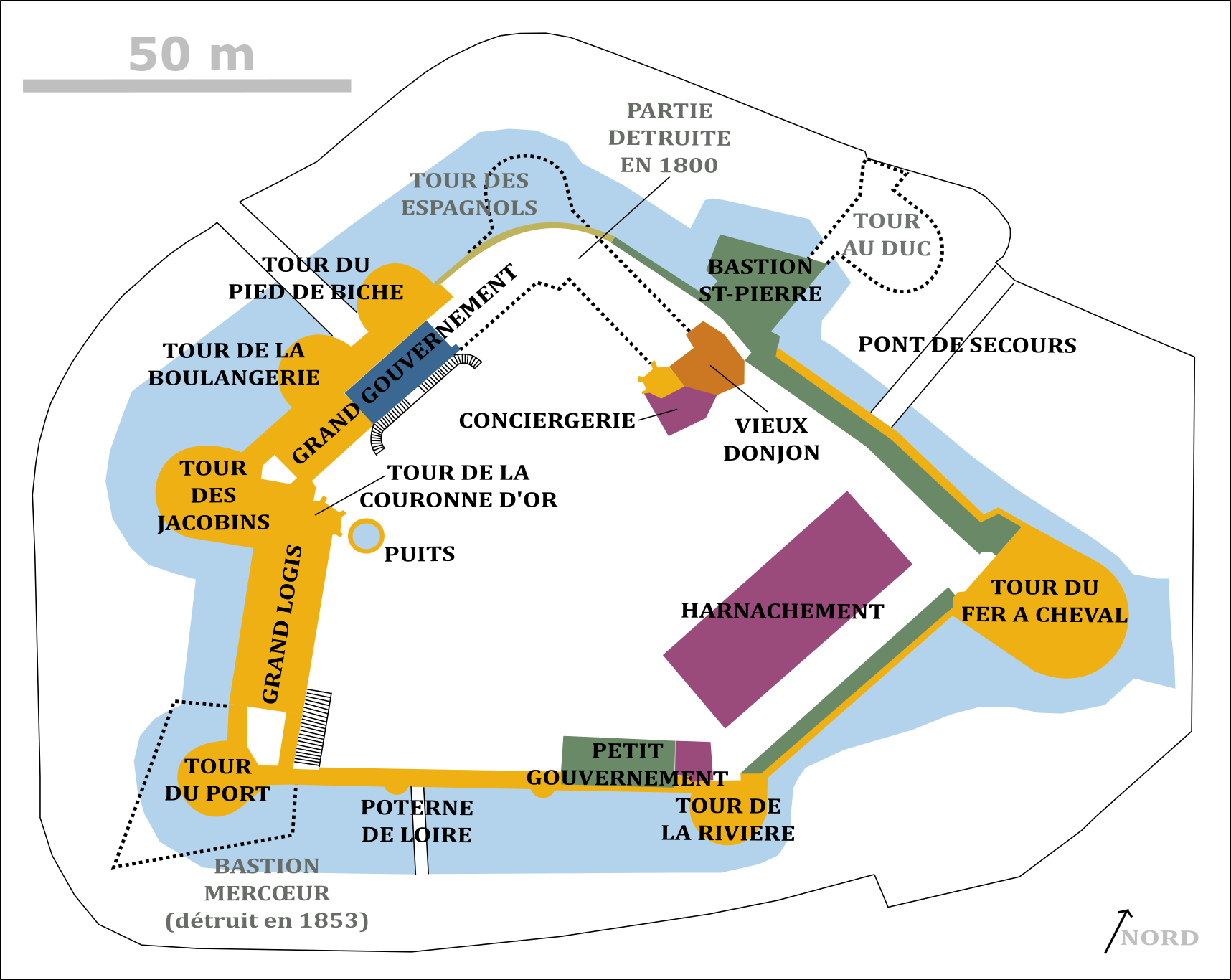 Plan du château des ducs de Bretagne, à Nantes, montrant ses divers éléments ainsi que les périodes de construction : Légende XIVème siècle XVème siècle XVIème siècle XVIIème siècle XVIIIème siècle XIXème siècle